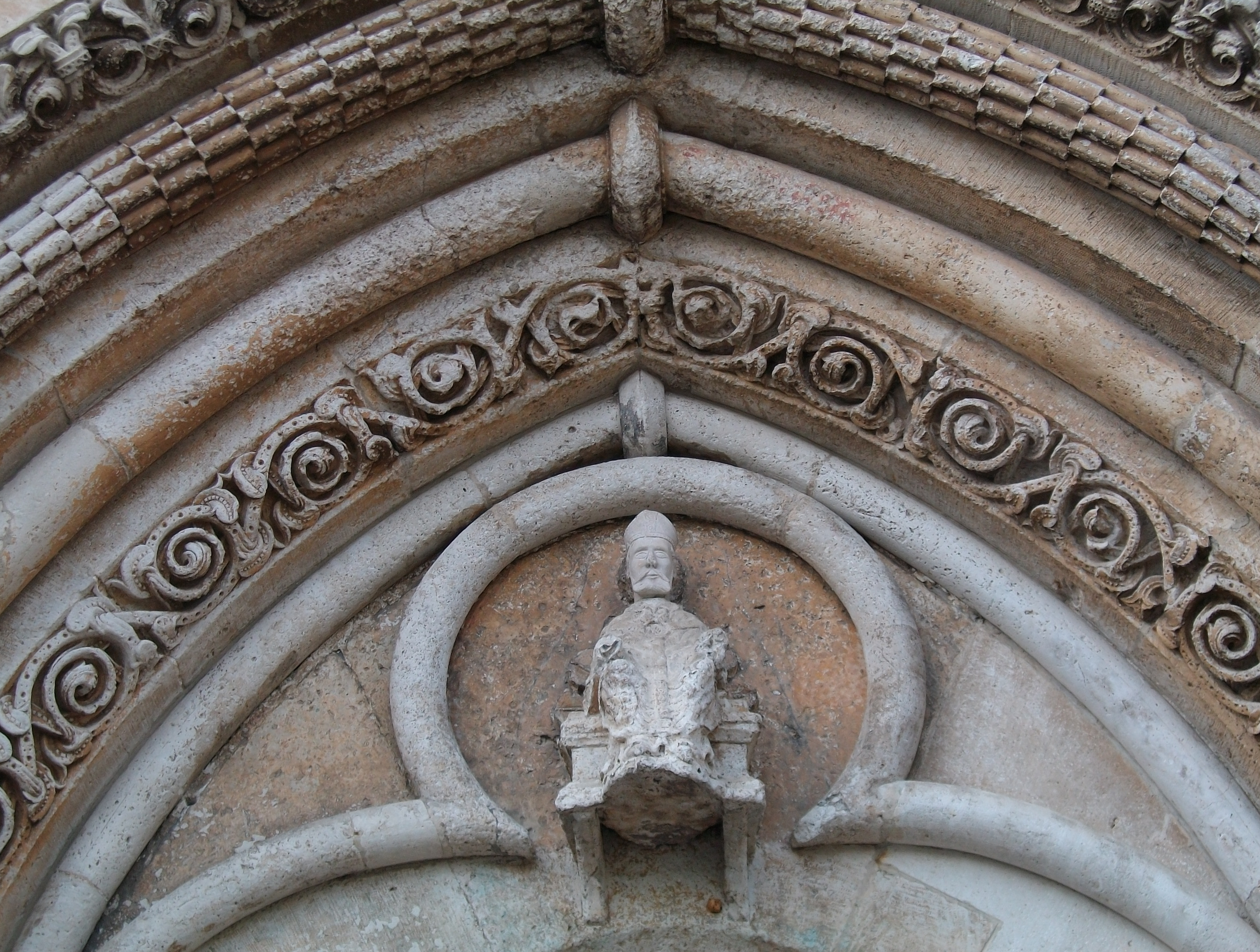 Nikolaikapelle, Südportal mit Schutzpatron St. Nikolaus, Obermarsberg (Germany)